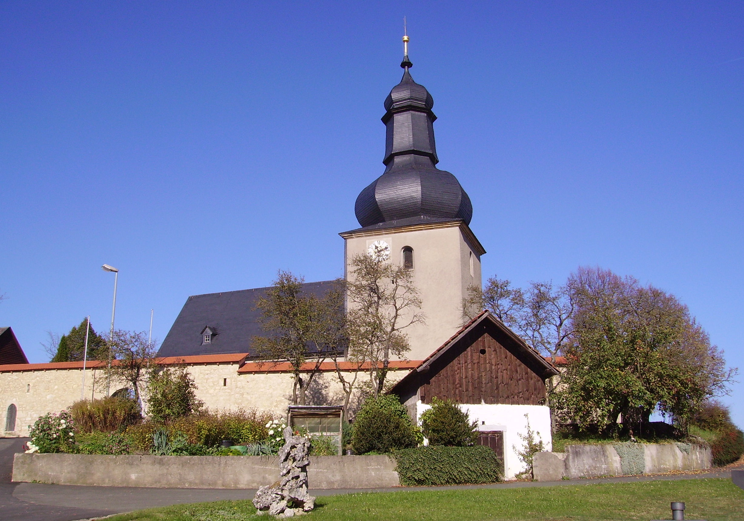 view of Hohenpölz, part of Heiligenstadt in Oberfranken in Upper Franconia, Germany